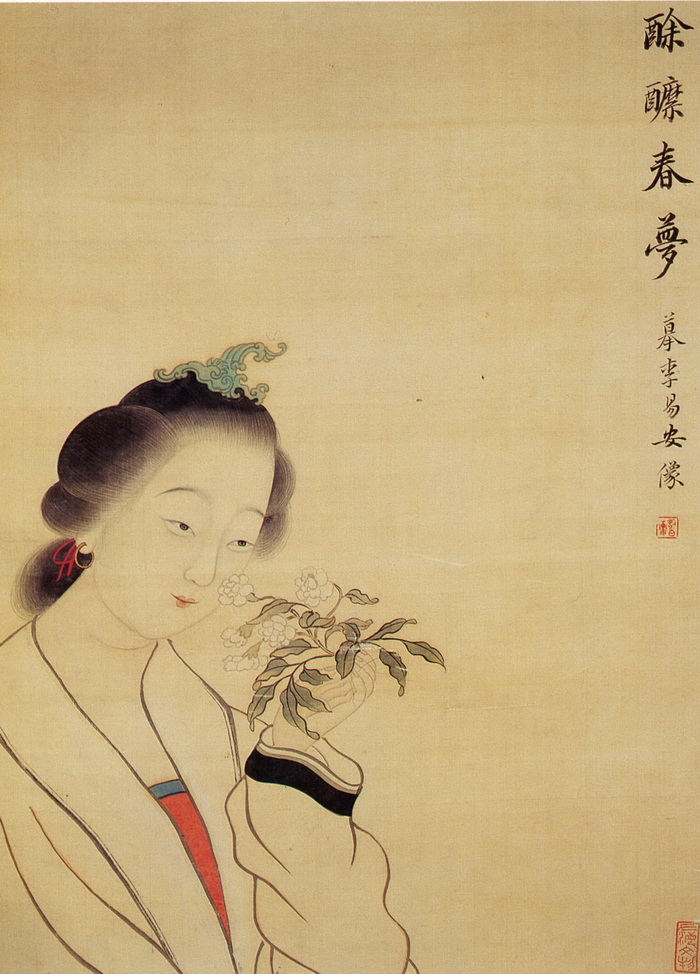 李清照畫像